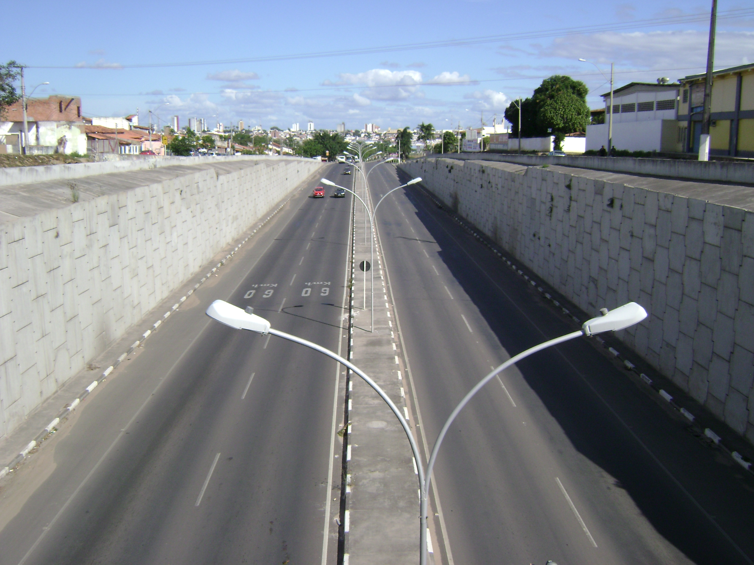 Vista da avenida José Falcão da Silva pelo Complexo Rodoviário José Ronaldo de Carvalho, em Feira de Santana, Bahia, Brasil.